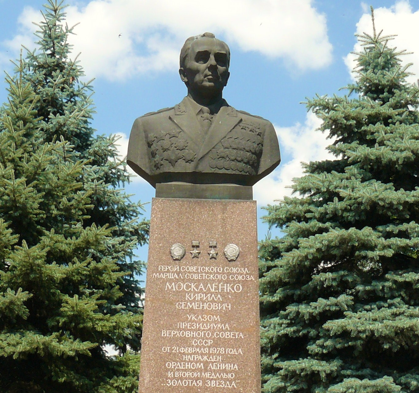 Pomnik Kiryła Moskalenki w Krasnoarmijsku.